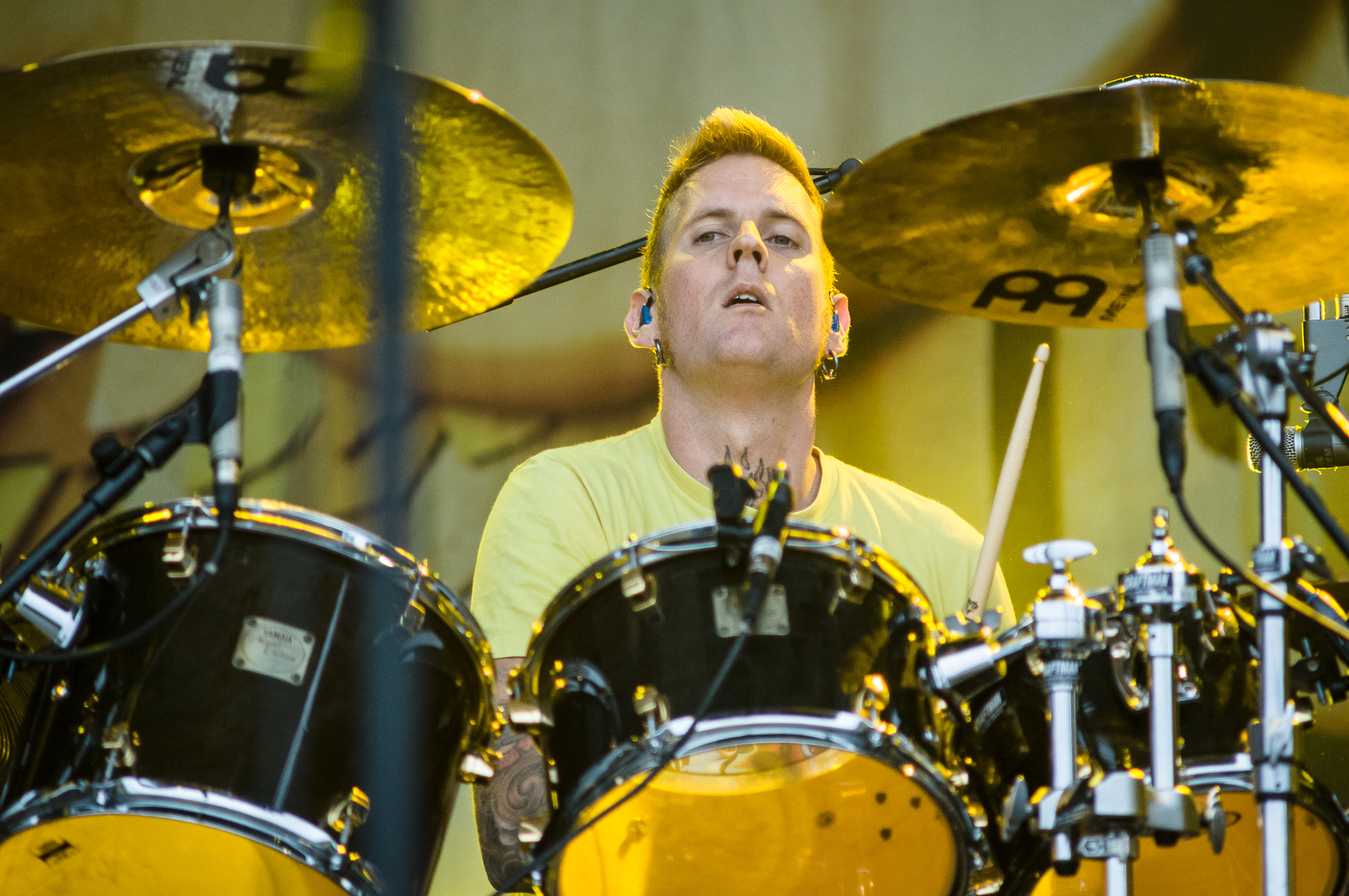 Brann Dailor - perkusista zespołu Mastodon podczas koncertu na festiwalu Ursynalia 2012.